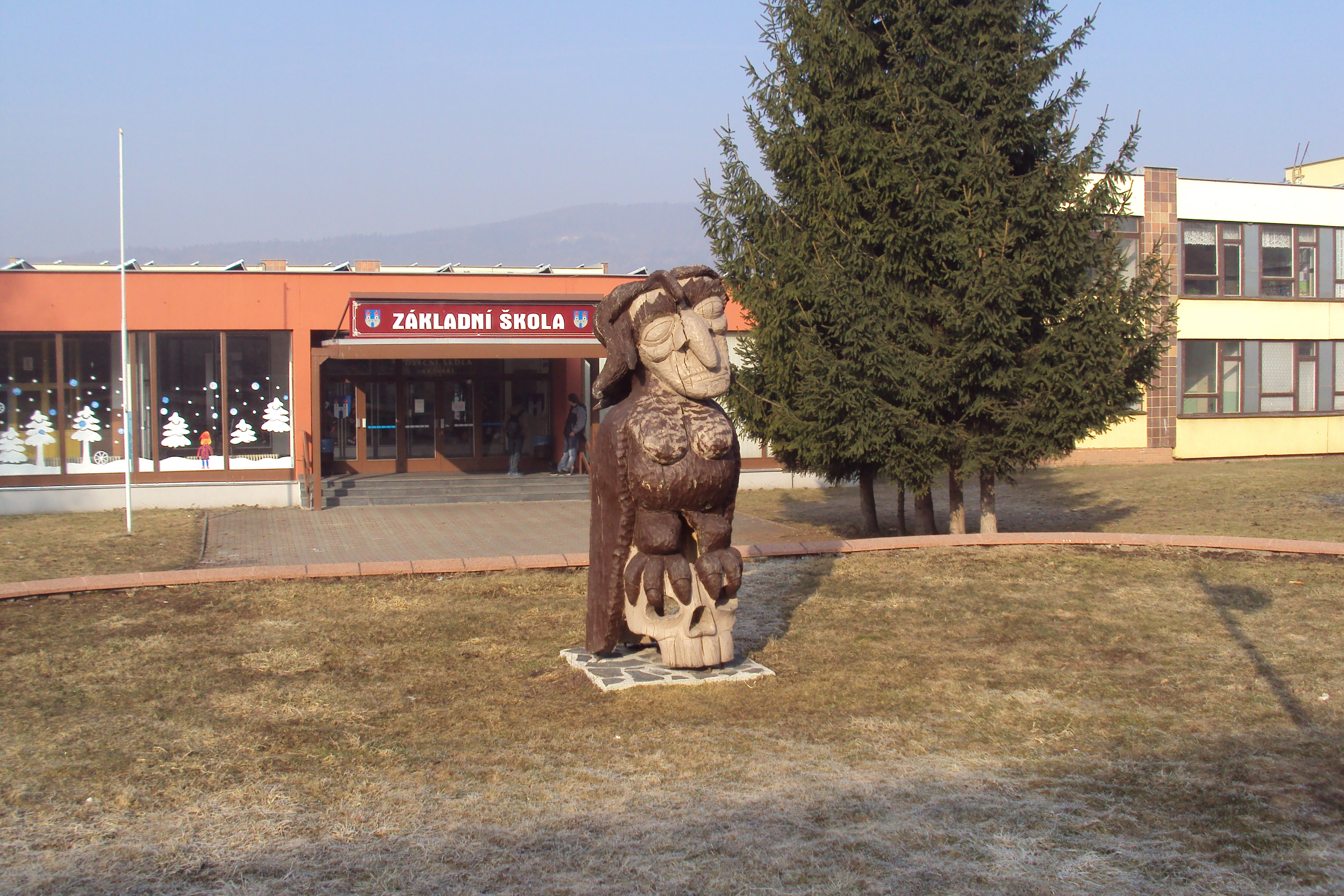 Základní škola v Kravařích u České Lípy